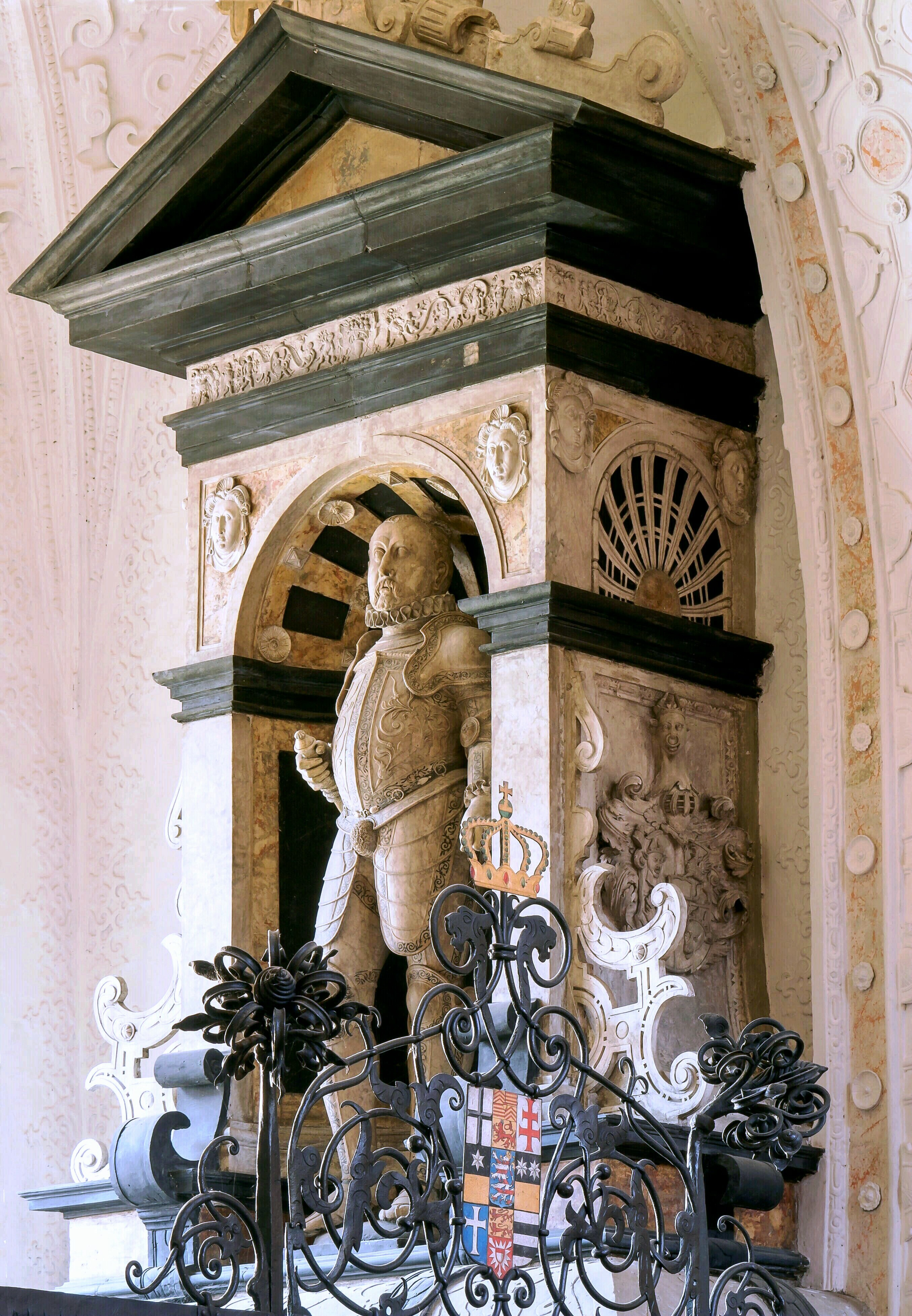 Prunkvolles frühbarockes Grabmal des Landgrafen Philipp II. von Hessen-Rheinfels in einer Kapelle des nördlichen Seitenschiffes der Stiftskirche von St. Goar; errichtet zwischen 1592 und 1599. Künstler ist vermutlich Wilhelm Vernuiken, hessischer Hofbildhauer und -architekt.